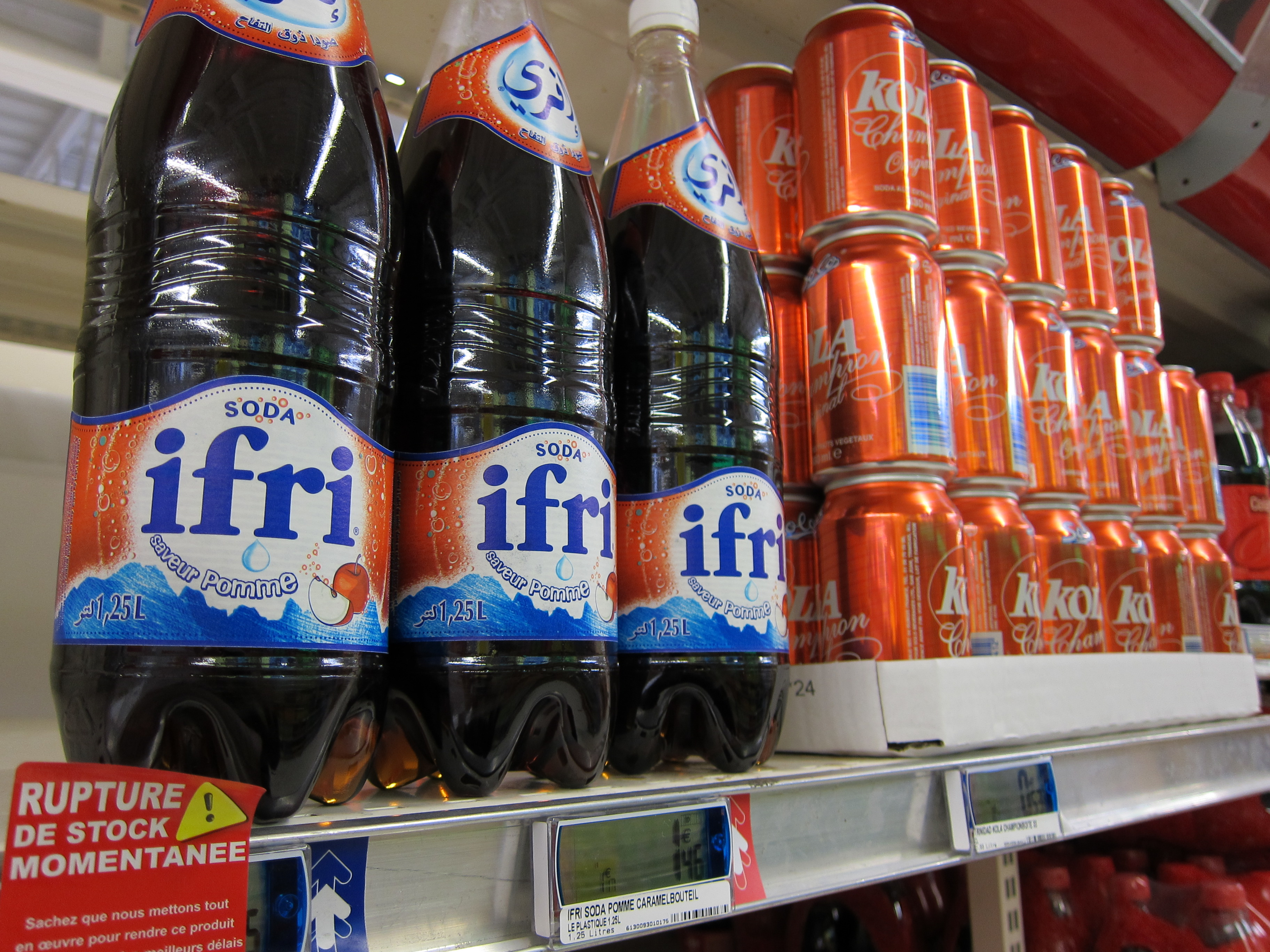 Sainte-Geneviève-des-Bois (Essonne) : Sodas Ifri dans un supermarché Carrefour.